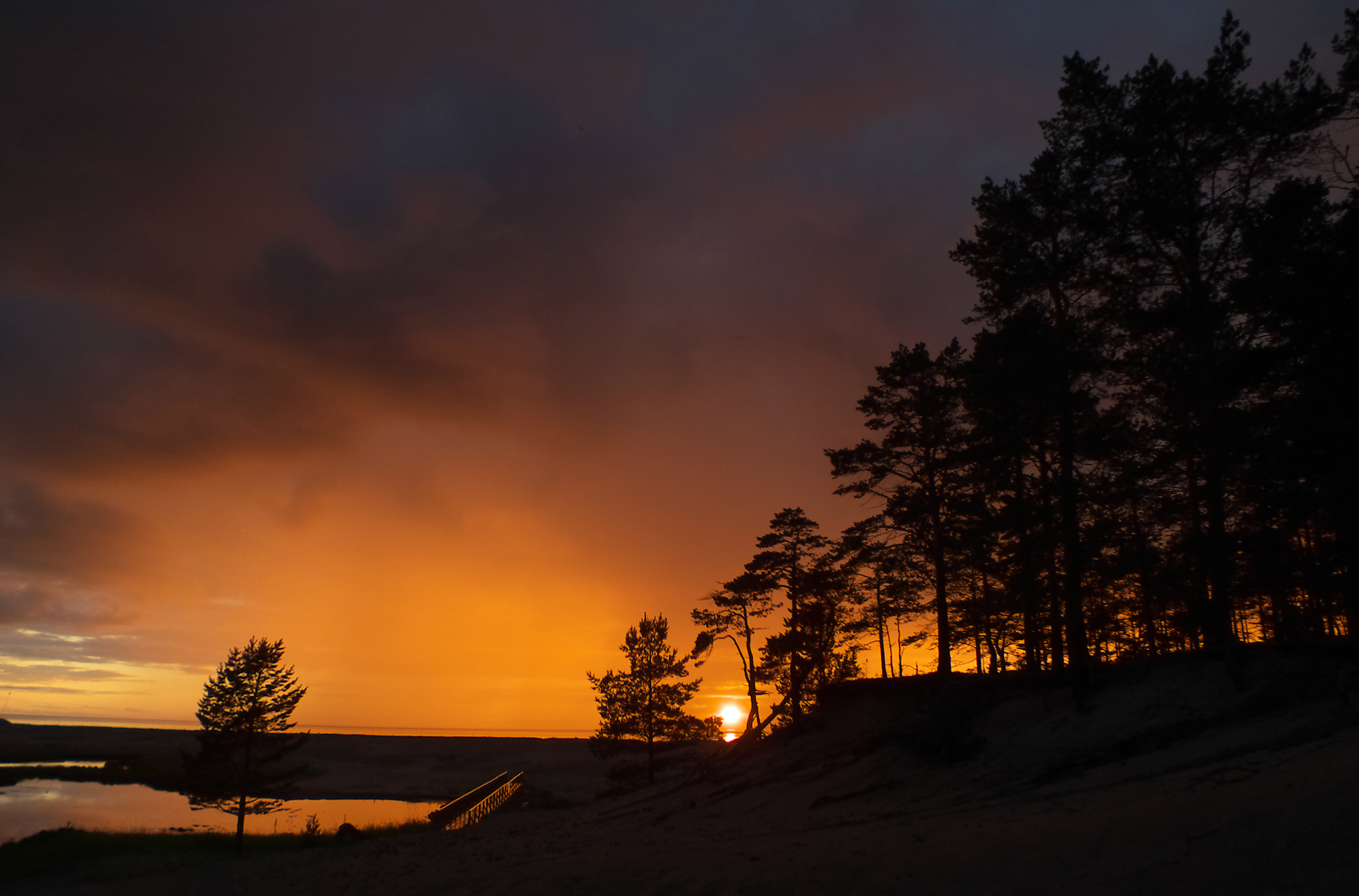 Национальный парк Онежское Поморье, Онежский район This image is related to the protected area of Russia number 2900123